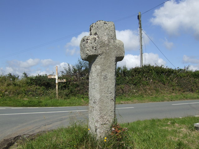 Bosent Cross